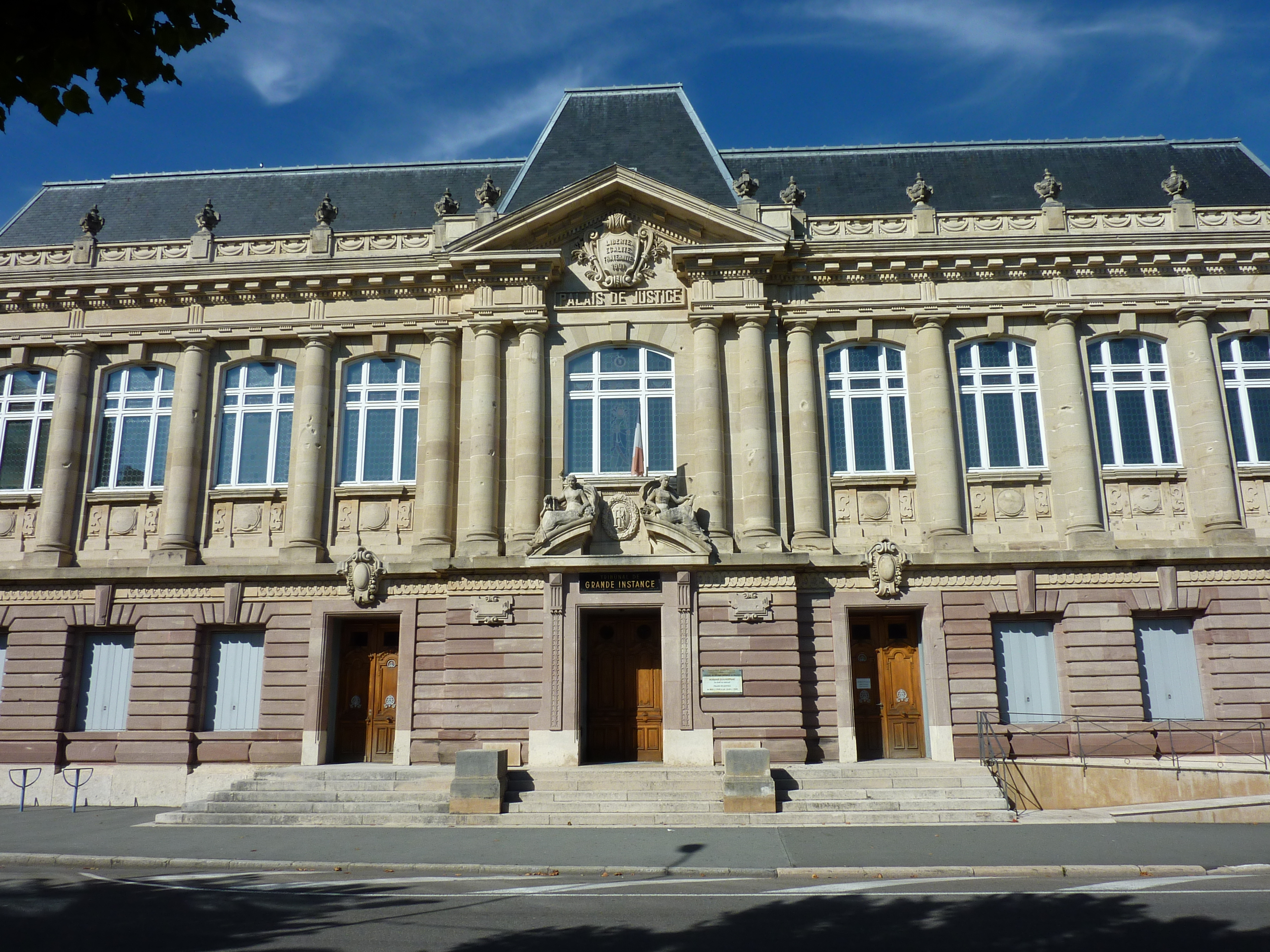 Tribunal de grande instance de Belfort